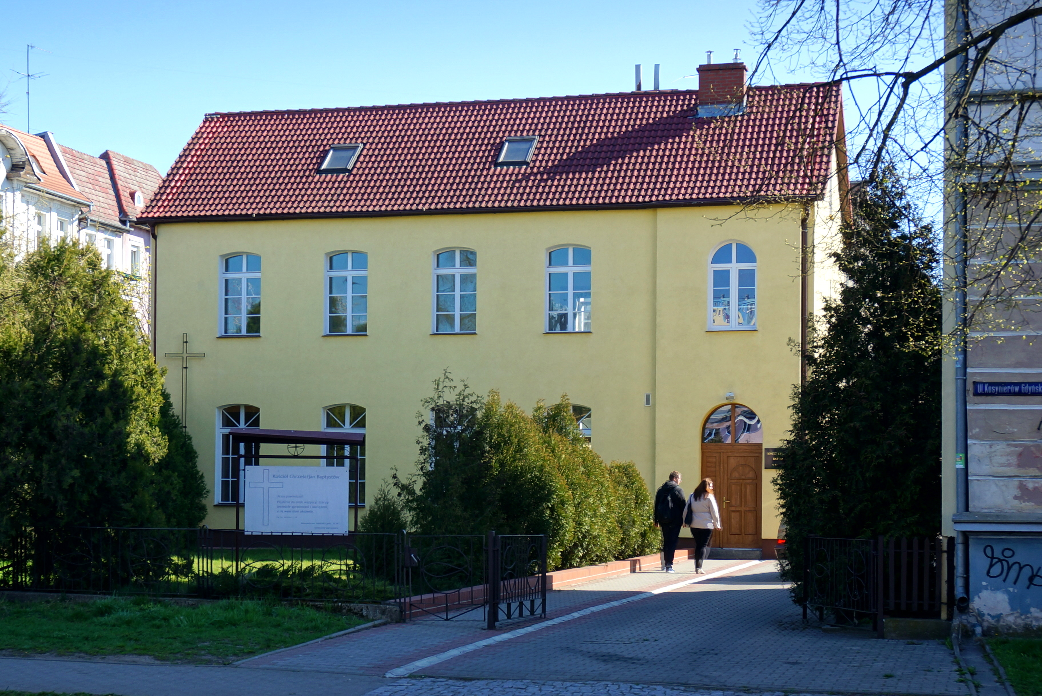 Gorzów Wlkp., ul. Kosynierów Gdyńskich 64. Zbór Kościoła Chrześcijan Baptystów